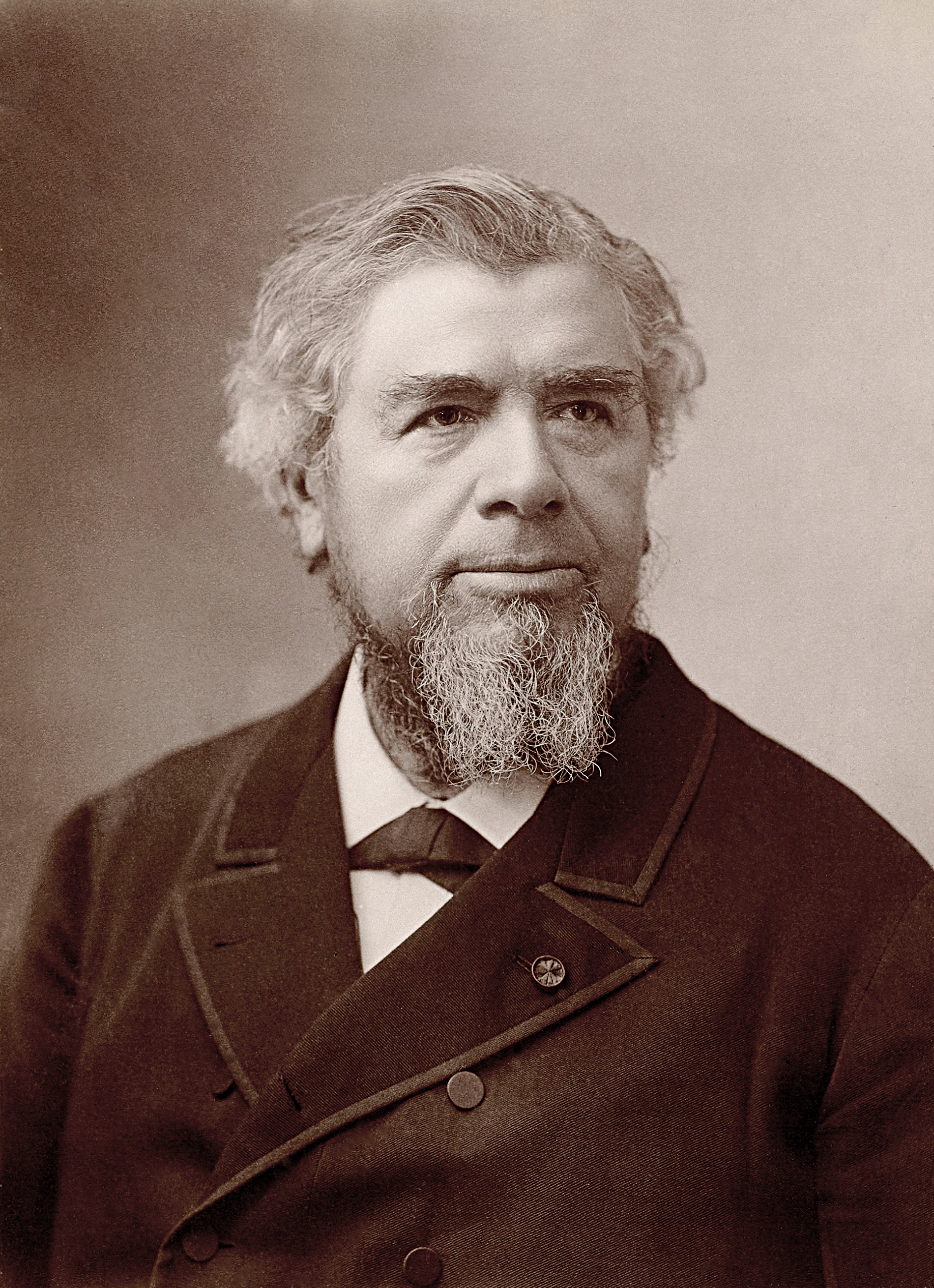 Georges Cloué (1817 - 1889), amiral, administrateur et homme politique français